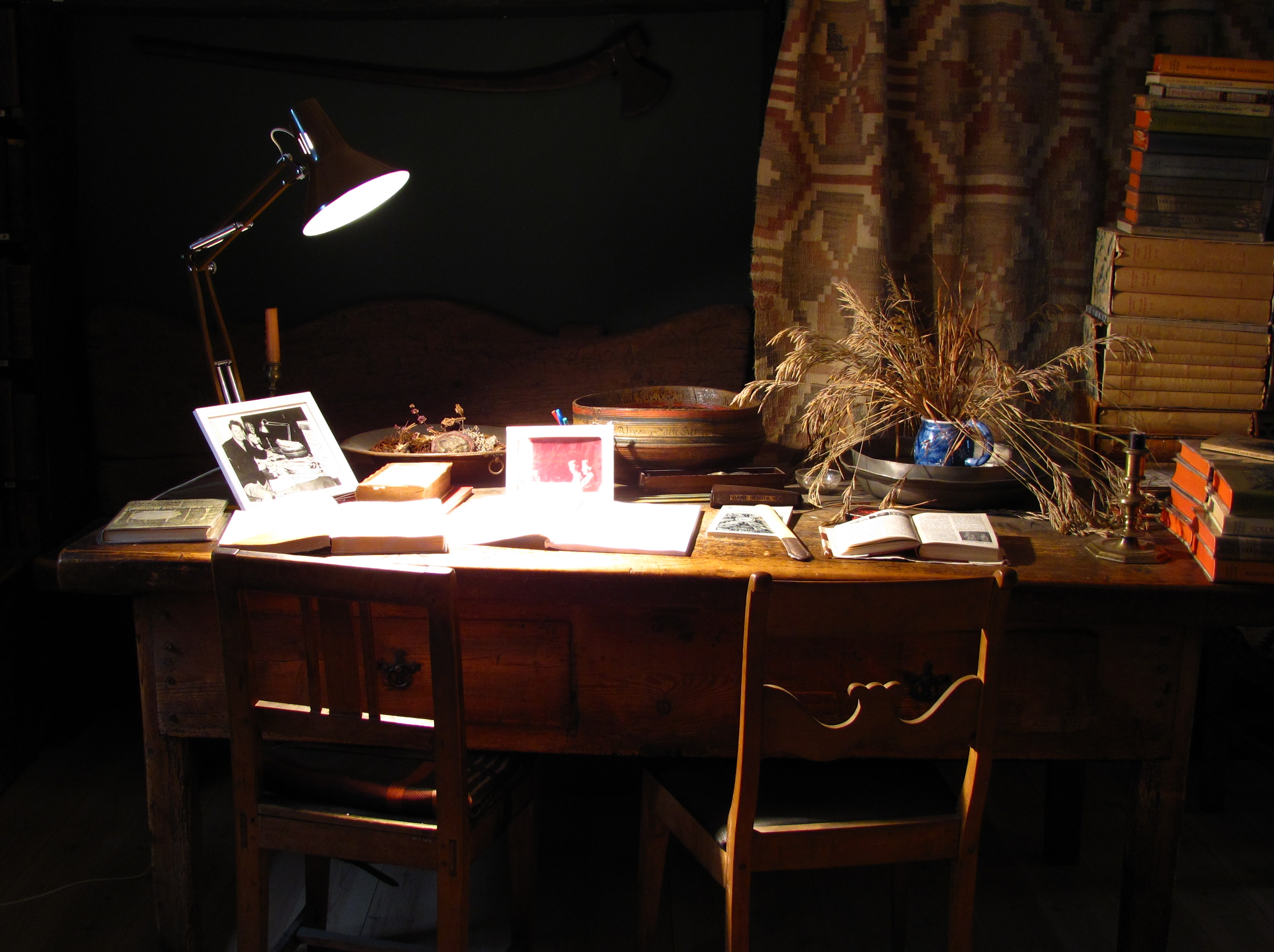 Setesdalsmuseet, Hans Henrik Holms diktarstove